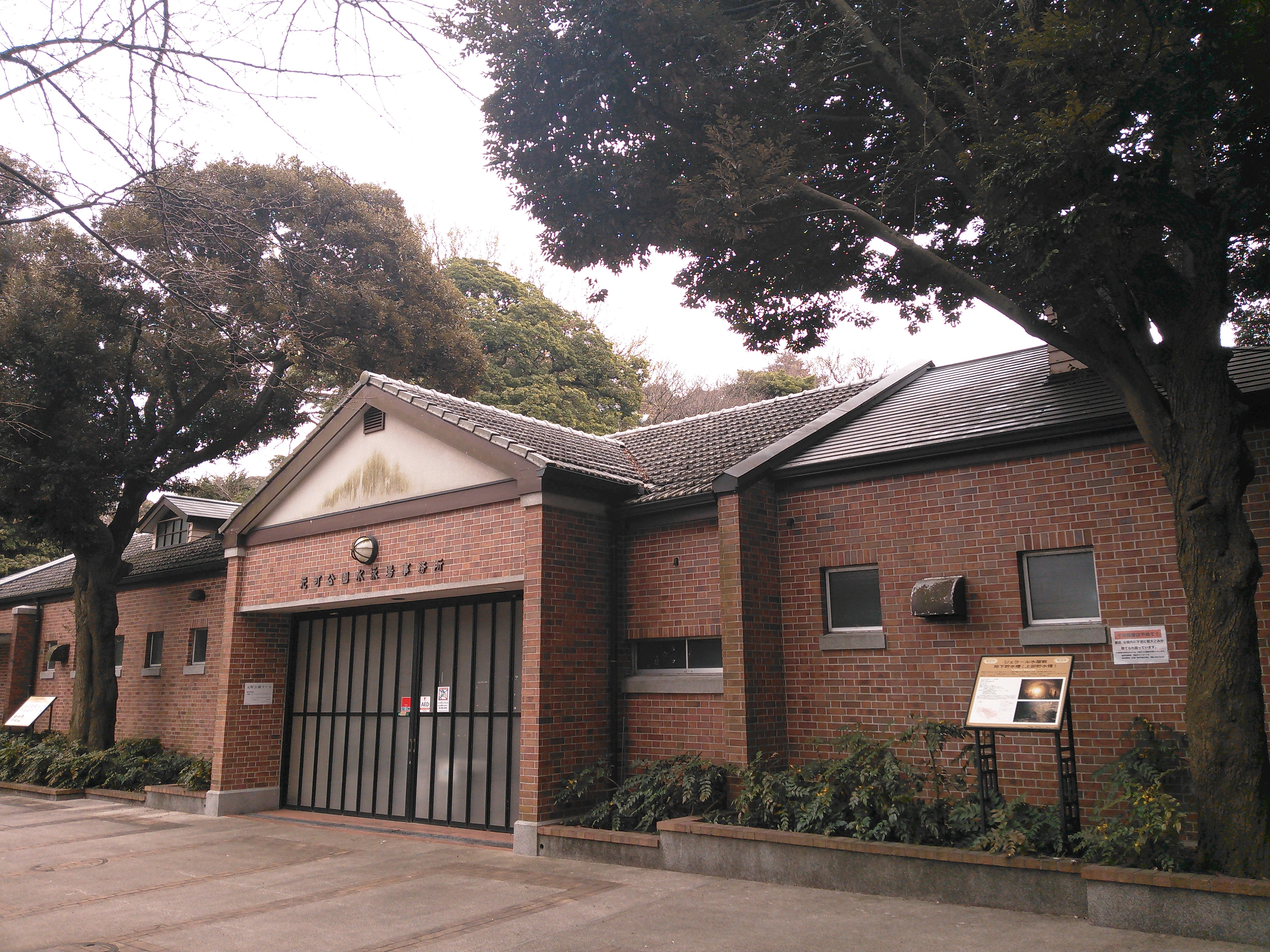 横浜市中区、元町公園のプール管理棟。ジェラール瓦で葺かれている。